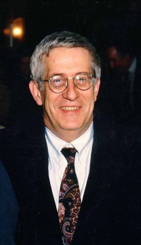 Prof. Paolo Pancheri